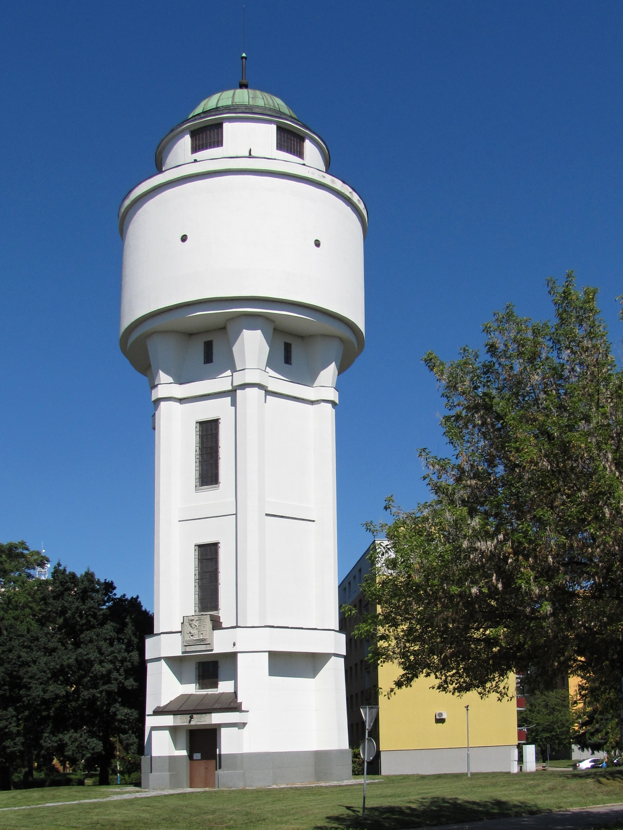 Vodárenská věž z roku 1927 v Sovadinově ulici v Břeclavi, vysoká 45 metrů